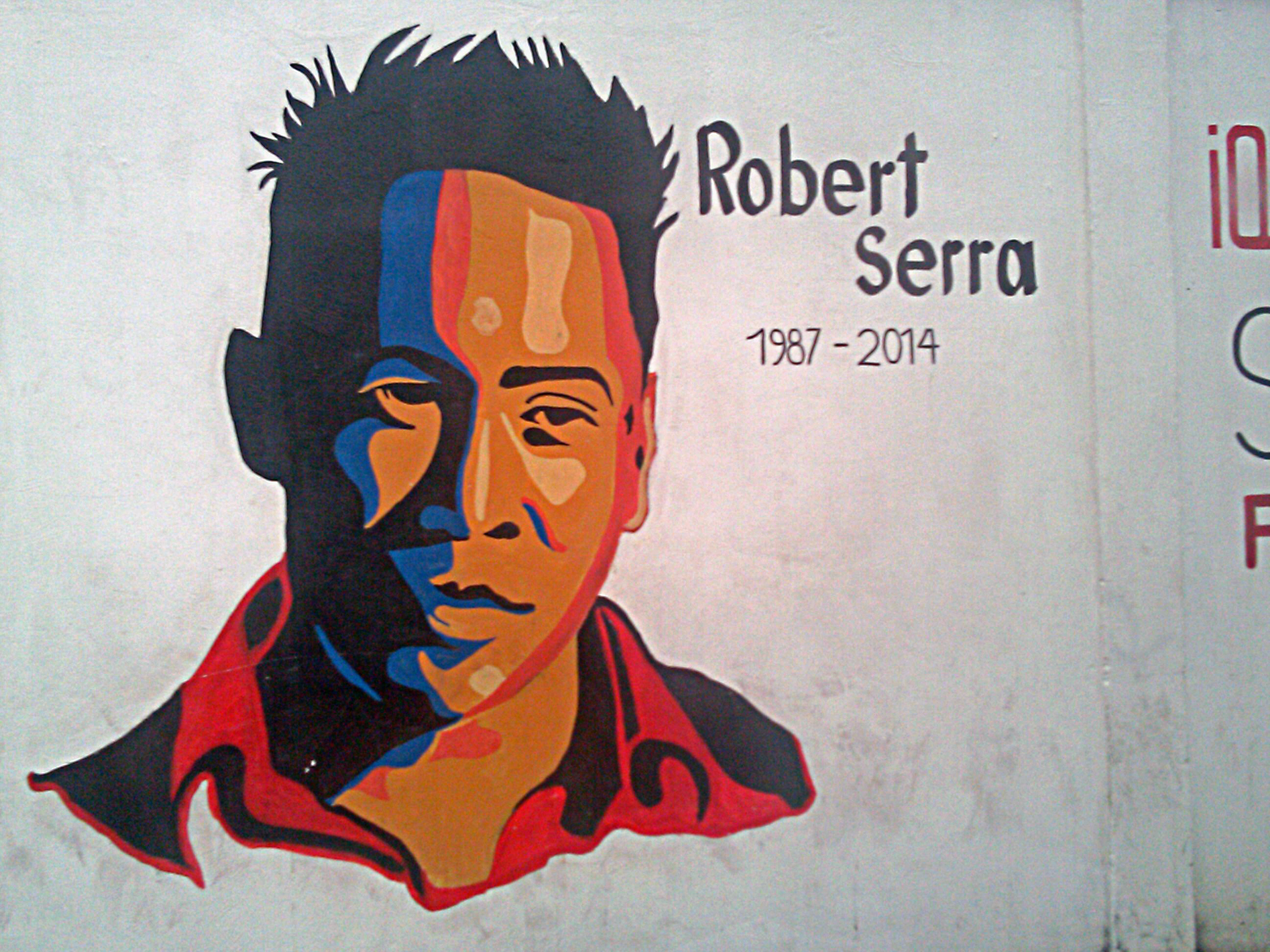 Mural de Robert Serra por las calles de Maturín, Edo. monagas.